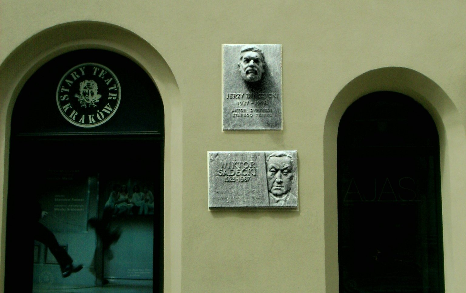 Jerzy Bińczycki i Wiktor Sadecki - aktorzy Teatru Starego w Krakowie.